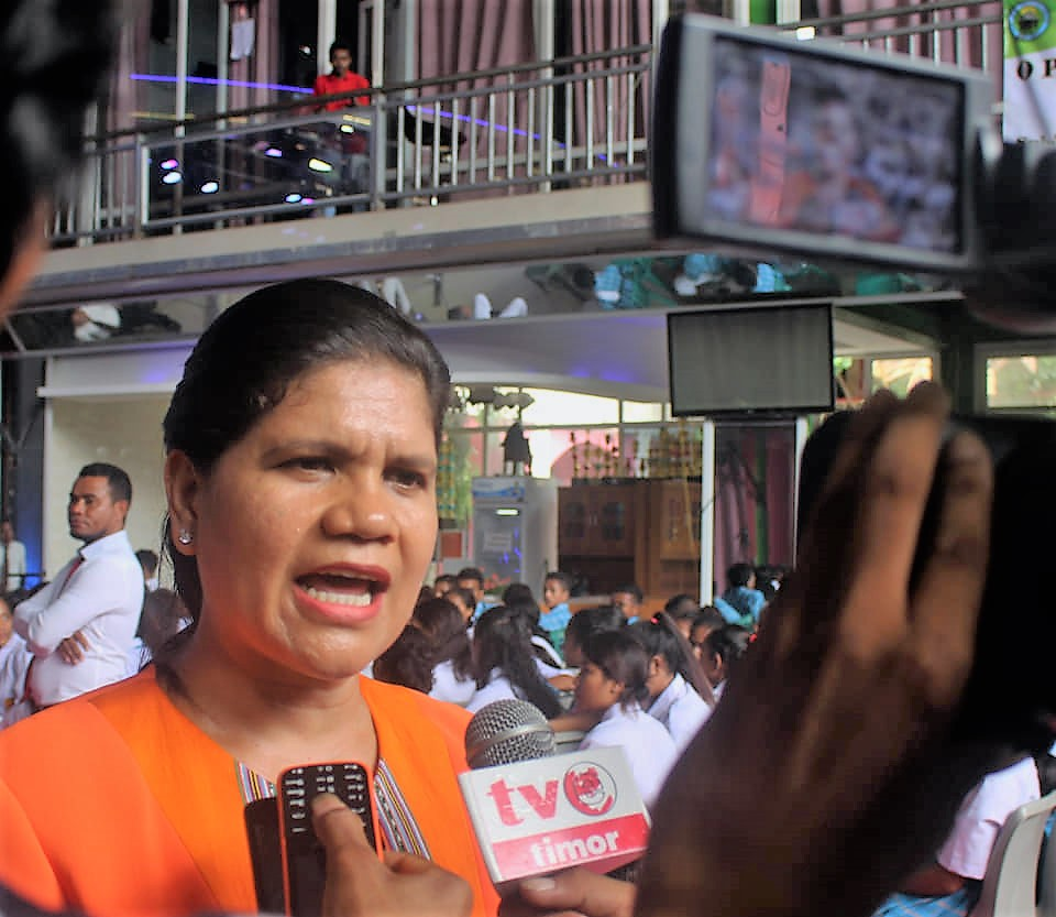 Isabel da Costa Ferreira wird von TVE interviewt.